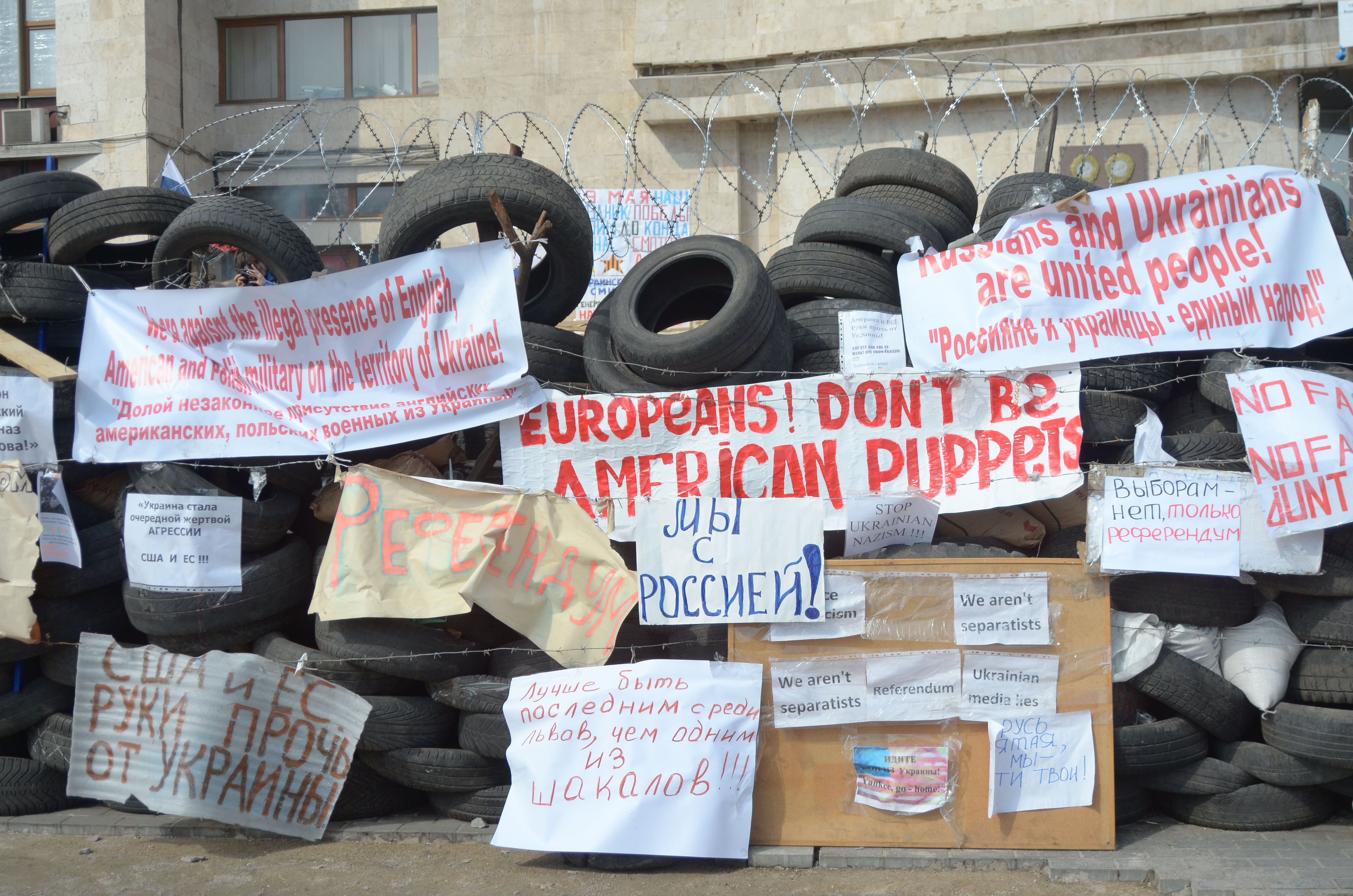 Протесты в Донецке